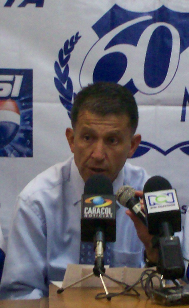 Juan Carlos Osorio, football manager.